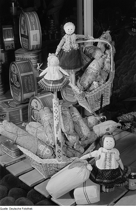 Original image description from the Deutsche Fotothek Dosenfleisch und Salami aus Ungarn, dekoriert mit Puppen auf der Leipziger Herbstmesse 1954